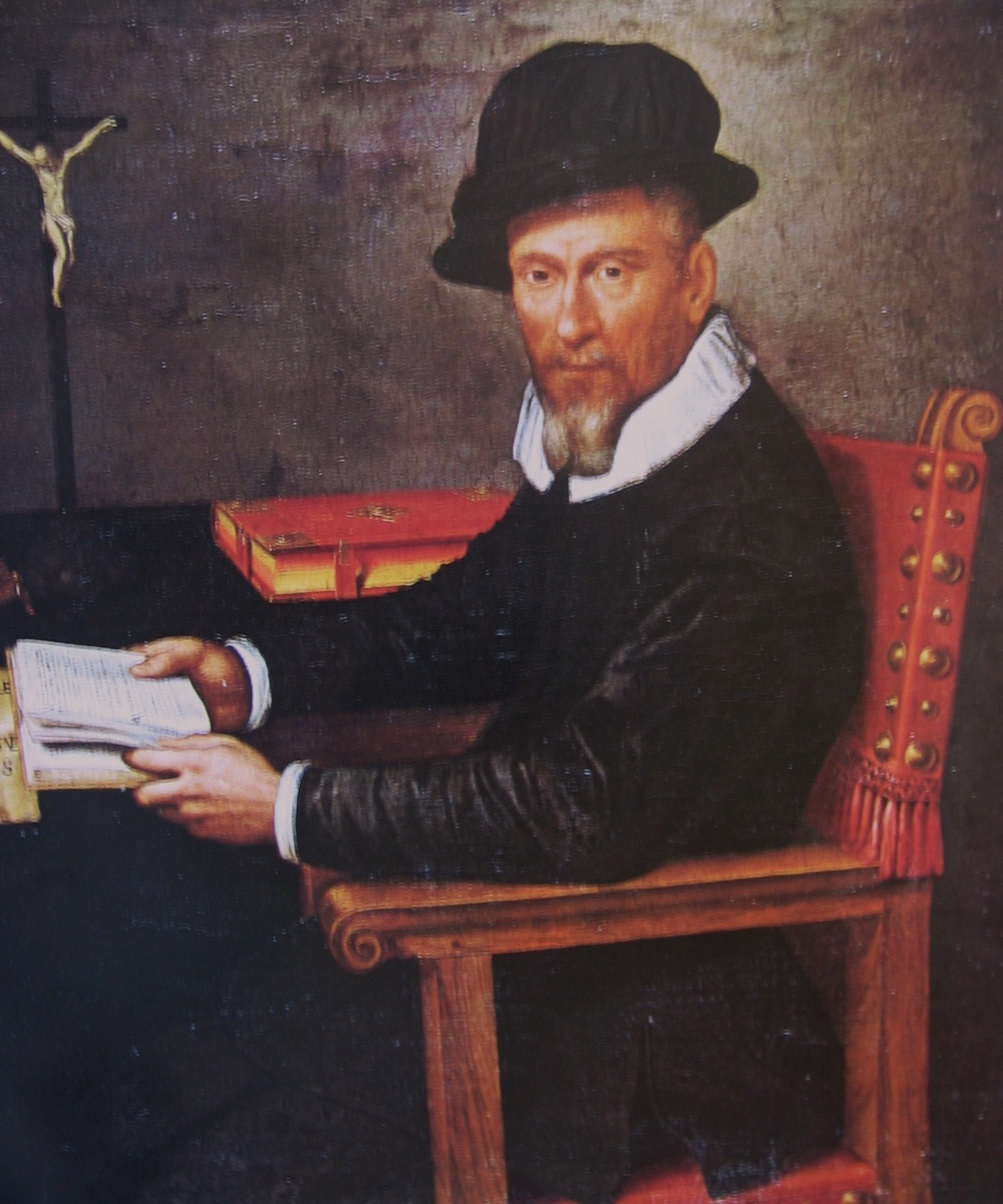 Ritratto di gentiluomolabel QS:Lit,"Ritratto di gentiluomo"